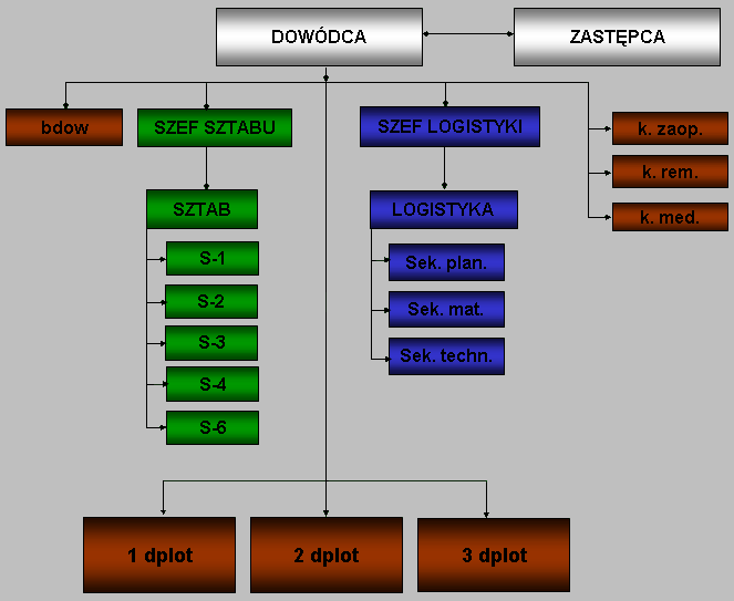 Struktura 8pplot w Koszalinie